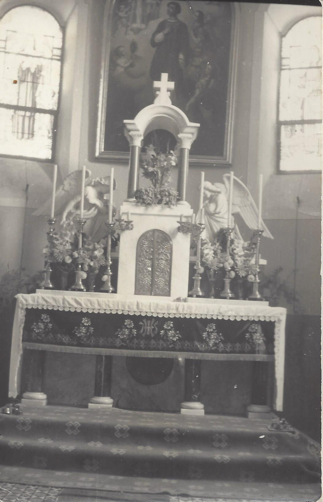 Oltář v kostele sv. Vavřince